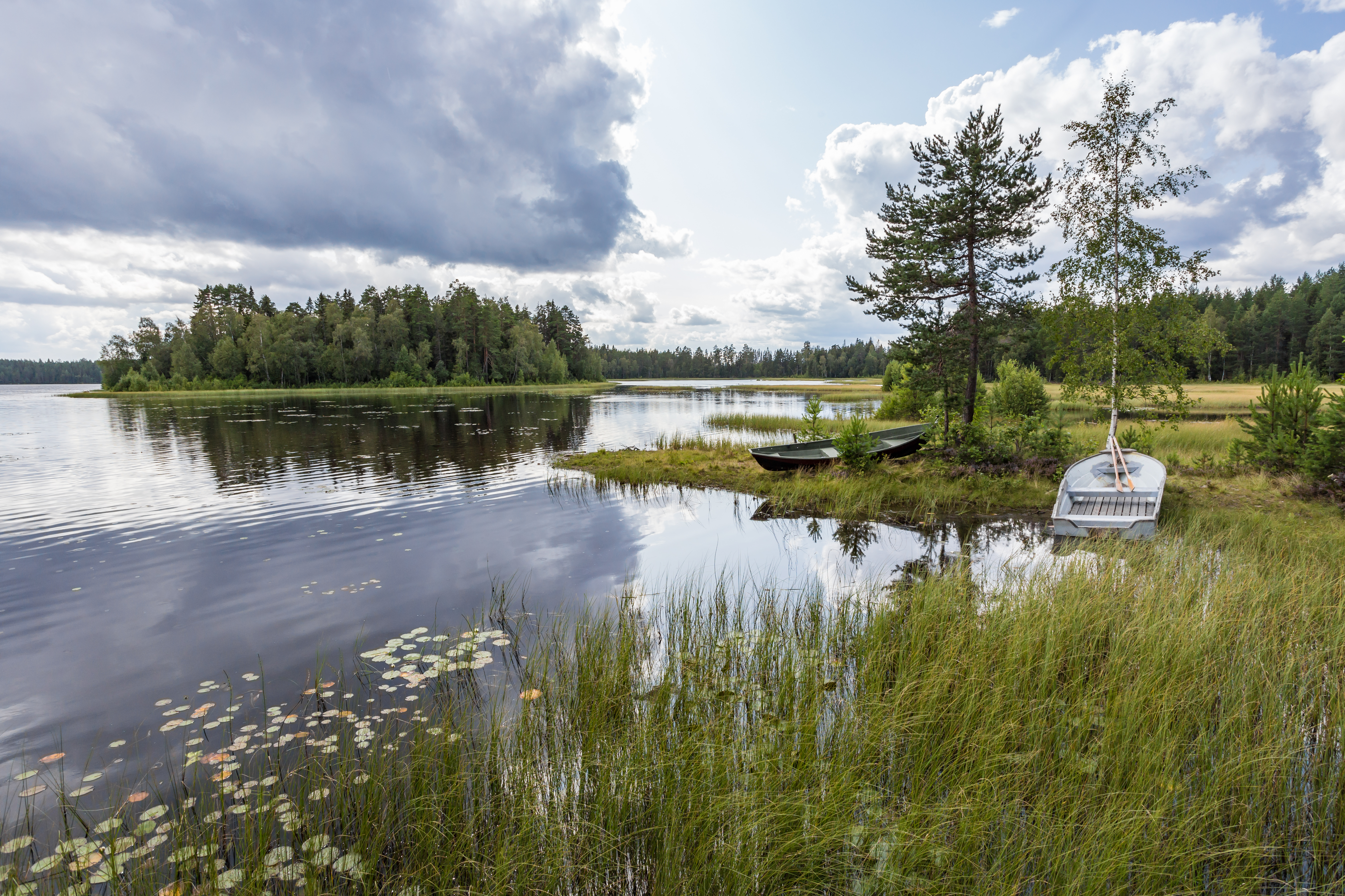 Rafshytte-Dammsjön, Hedemora kommun, Dalarnas län, Sverige